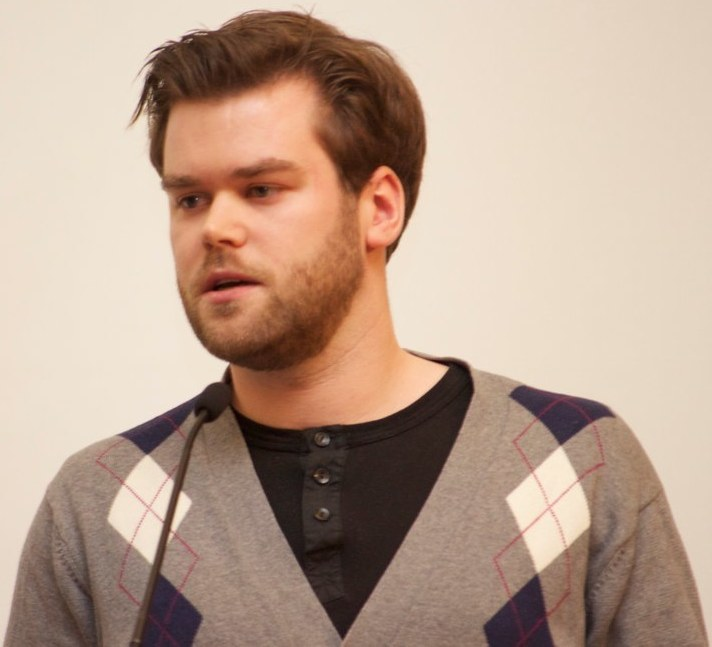 Oslo Venstres nominasjonsmøte 2010. Foto: Kjartan Almenning